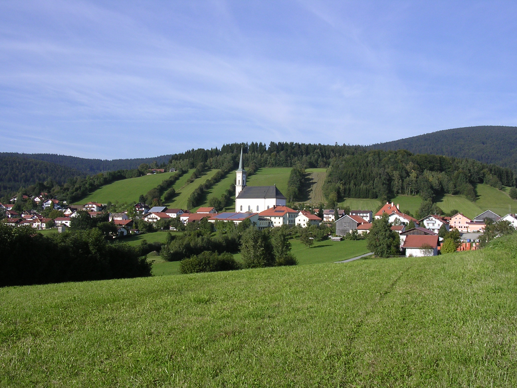 Grainet